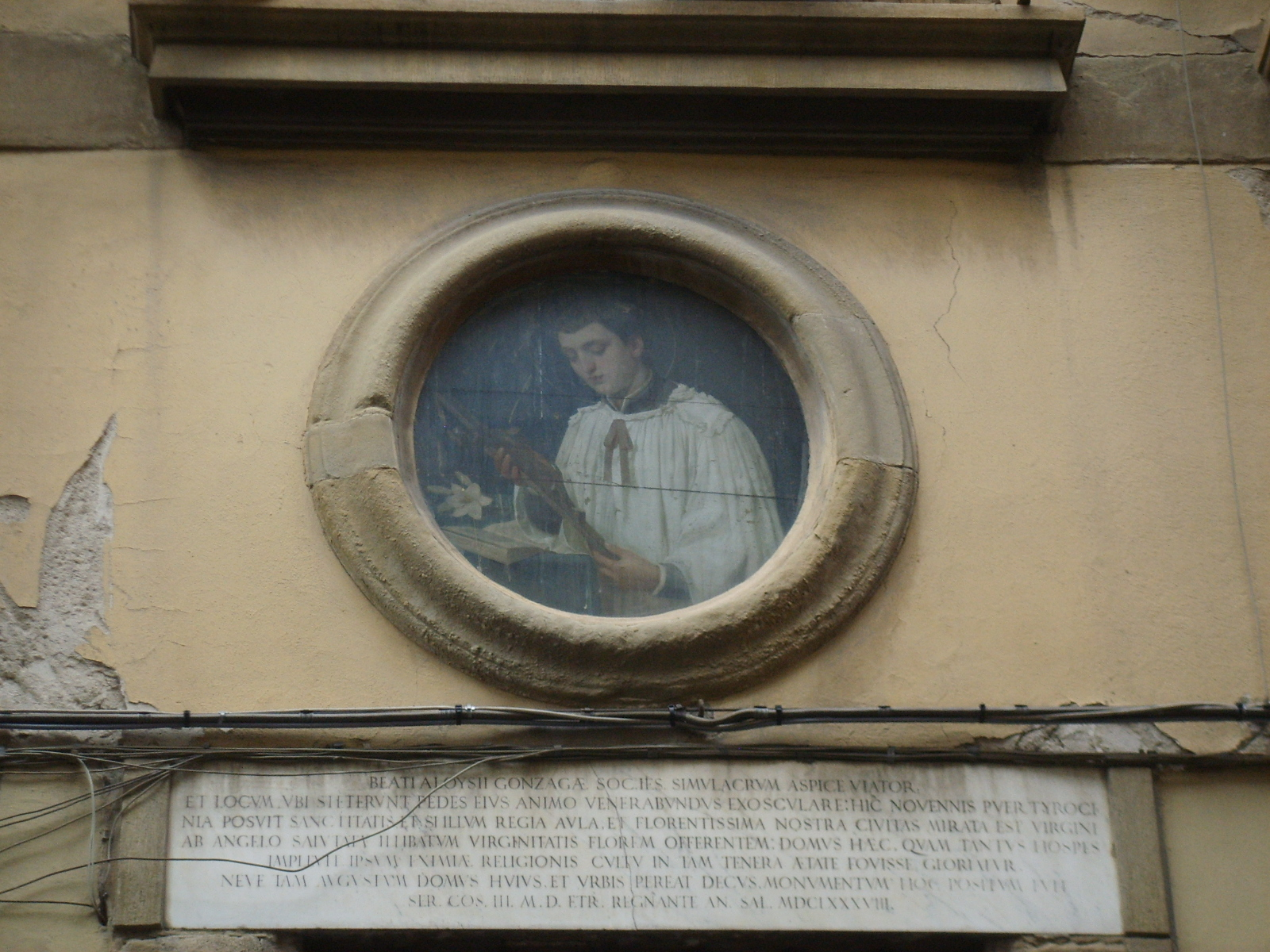 Via alfani, tabernacolo aloisio gonzaga